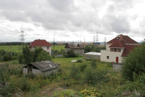 Россия, Корабсельки